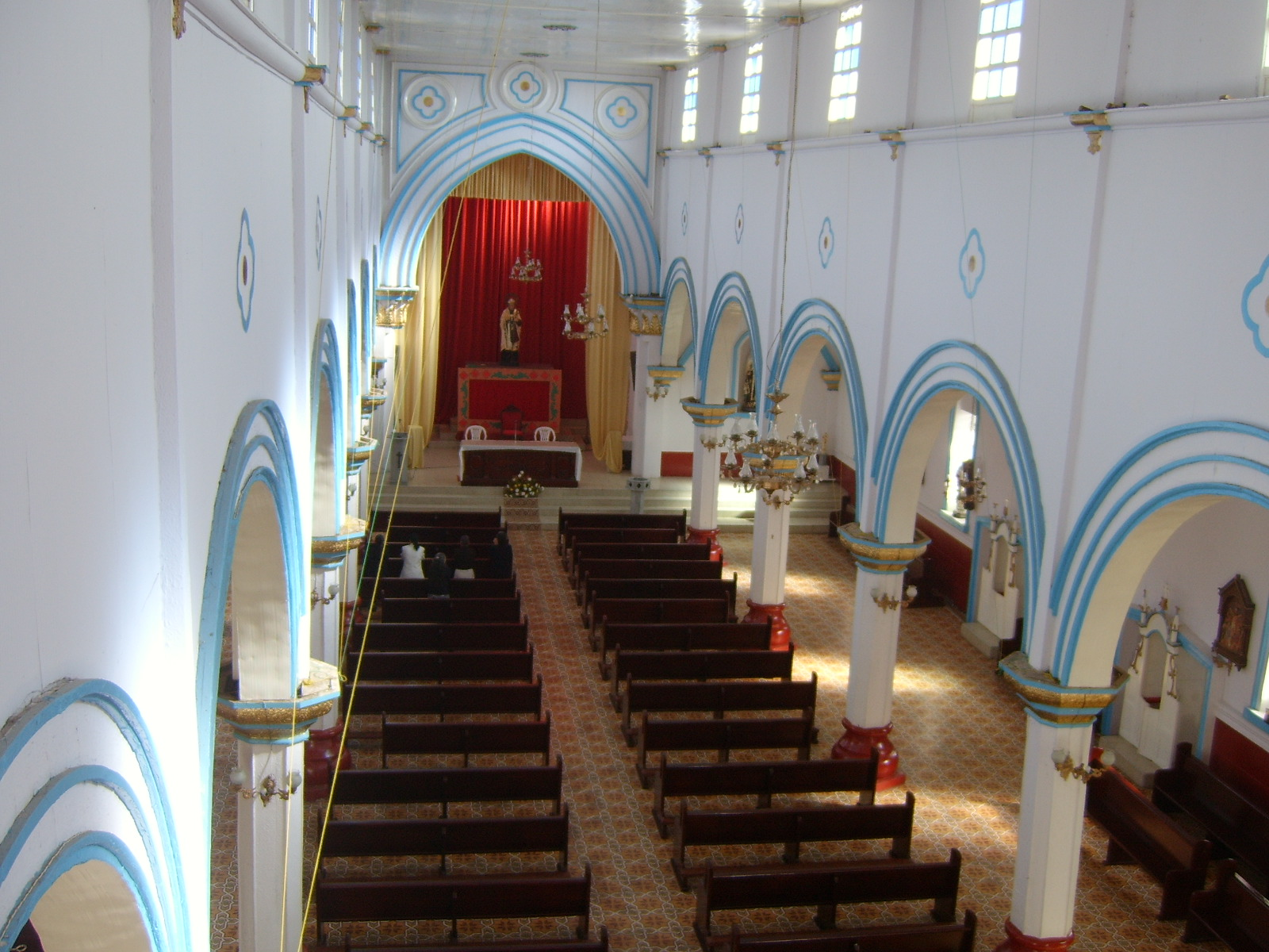 Interior de la Iglesia de San Julián, Municipio de Argelia de María, Antioquia, Colombia.